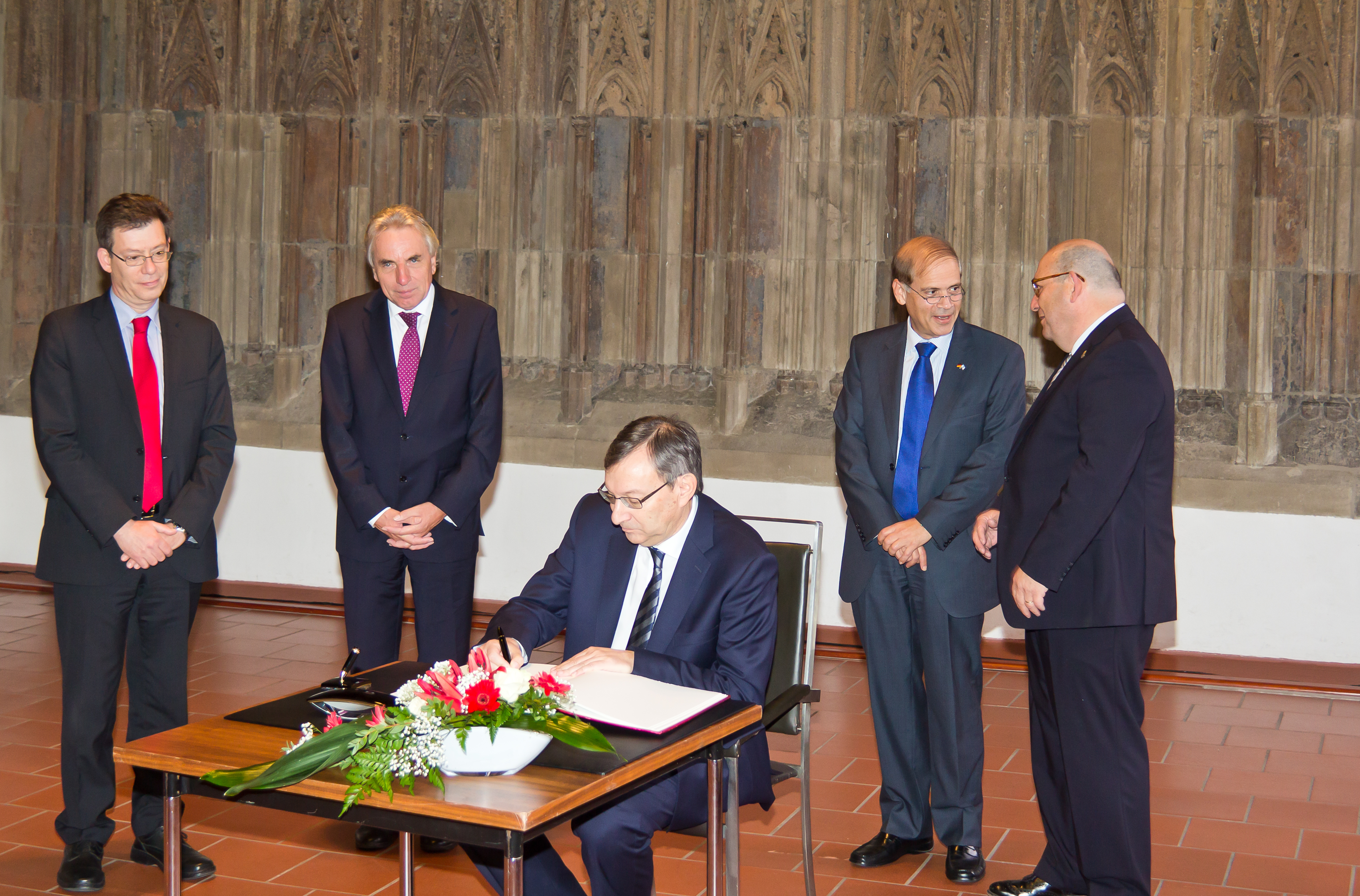 Kölns Oberbürgermeister Jürgen Roters empfängt Israels Botschafter Yakov Hadas-Handelsman anlässlich des 60. Jahrestages der Eröffnung der ersten Mission des Staates Israel in Deutschland. Foto: Abraham Lehrer, Vorstandsmitglied der Synagogen-Gemeinde Köln, trägt sich in der Gästebuch der Stadt Köln ein.